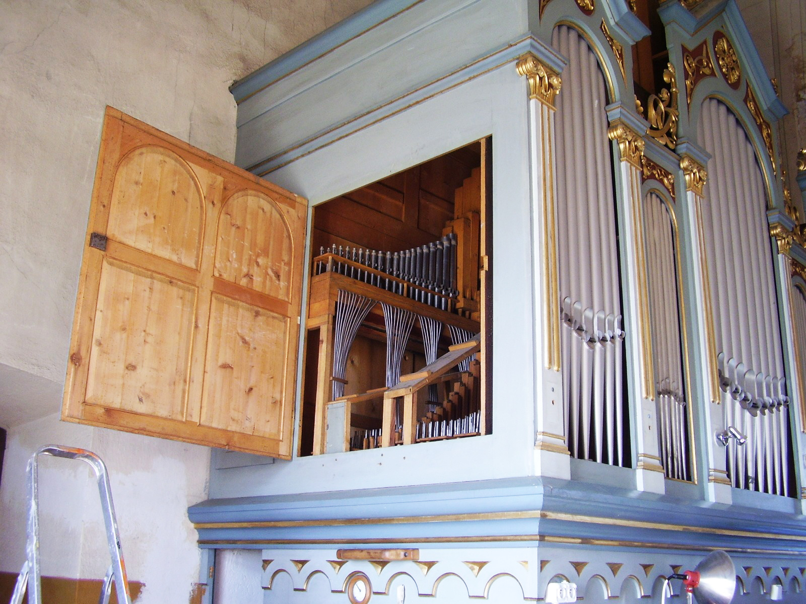 Pohľad do vnútra organovej skrine po generálnej oprave v roku 2019